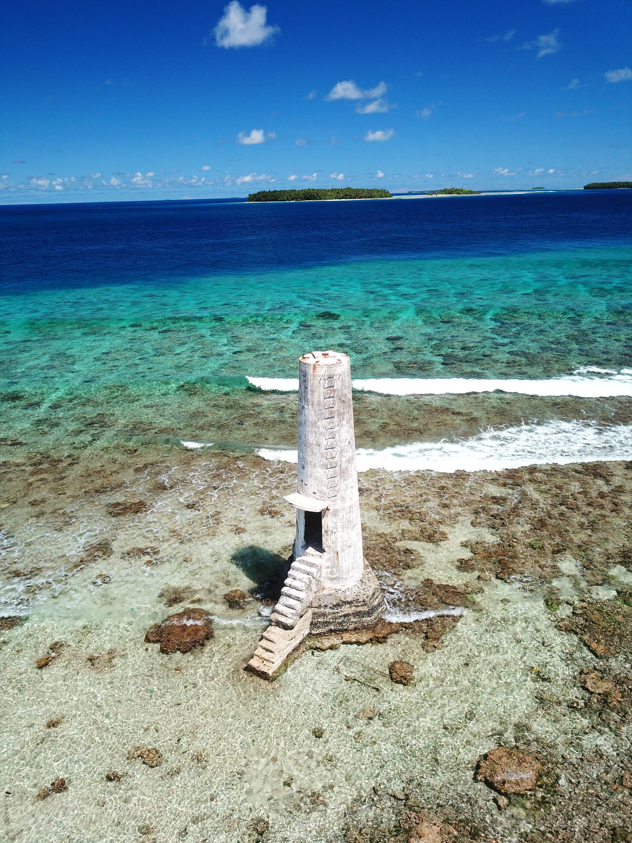 Chuuk lighthouse at North east